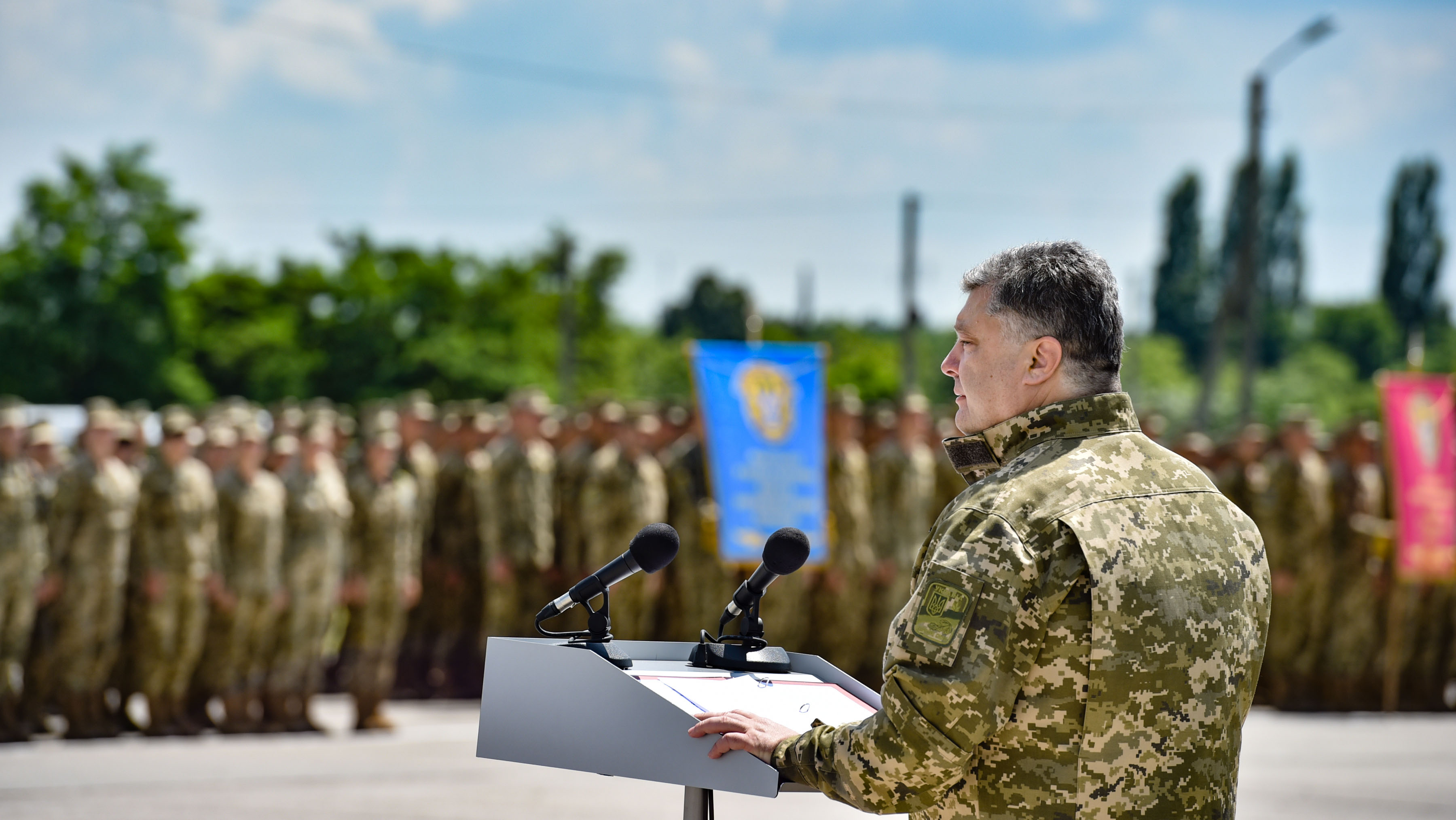 В рамках відвідин університету, Главі держави були продемонстровані польоти бойової авіаційної техніки та зразки техніки. В урочистому заході також взяли участь Міністр оборони України генерал армії України Степан Полторак, начальник Генерального штабу ЗС України генерал армії України Віктор Муженко, посадові особи оборонного відомства та Збройних Сил України. Президент Петро Порошенко присвоїв Харківському університету Повітряних Сил імені Івана Кожедуба статус національного. Глава держави підписав відповідний Указ. Під час участі в урочистій церемонії вручення дипломів випускникам університету Президент наголосив на вагомих результатах діяльності викладацького колективу закладу та високо оцінив внесок у підготовку фахівців для Повітряних Сил України, подвиги випускників навчального закладу. "У загальній системі підготовки та виховання майбутнього офіцера вдалося гармонічно поєднати багаторічні традиції університету, сучасні новаторські підходи до навчання офіцерів-льотчиків та потужну навчально-матеріальну базу",- сказав Петро Порошенко. Президент зазначив, що Харківський університет протягом багатьох років випускав добре підготовлені та освічені кадри, які з честю виконують свій конституційний обов’язок та дотримуються присяги. Глава держави нагадав, що більше 200 військових Повітряних Сил відзначені державними нагородами за особисту мужність та героїзм. На жаль, 28 випускників університету загинули в зоні АТО. Присутні вшанували пам'ять загиблих. Глава держави привітав Університет з черговим випуском офіцерів-льотчиків, побажавши нових звершень в справі підготовки військових кадрів для українського війська. Петро Порошенко вручив дипломи з відзнакою та золоті медалі найкращим випускникам. Президент також вручив бойовий прапор Харківському національному університету Повітряних Сил імені Івана Кожедуба.